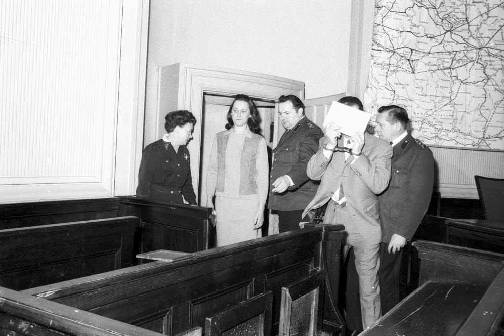 Im Schwurgericht. Gisela Werler und Hermann Wittorf auf der Anklagebank wegen zahlreicher Banküberfälle. Wittorf verbirgt durchgehend sein Gesicht. Er ist als einziger auch wegen Mordversuchs angeklagt.